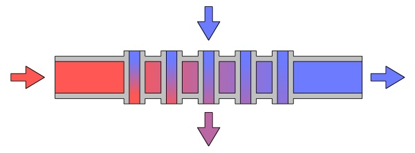 Figur på värmeväxlare av korsflödestyp Gjord av: Daniel Ryde, Skövde 2004-11-12 Licens: GFDL